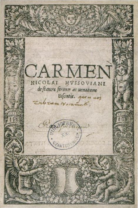 Беларуская (тарашкевіца): Мікалай Гусоўскі. Песьня пра зубра